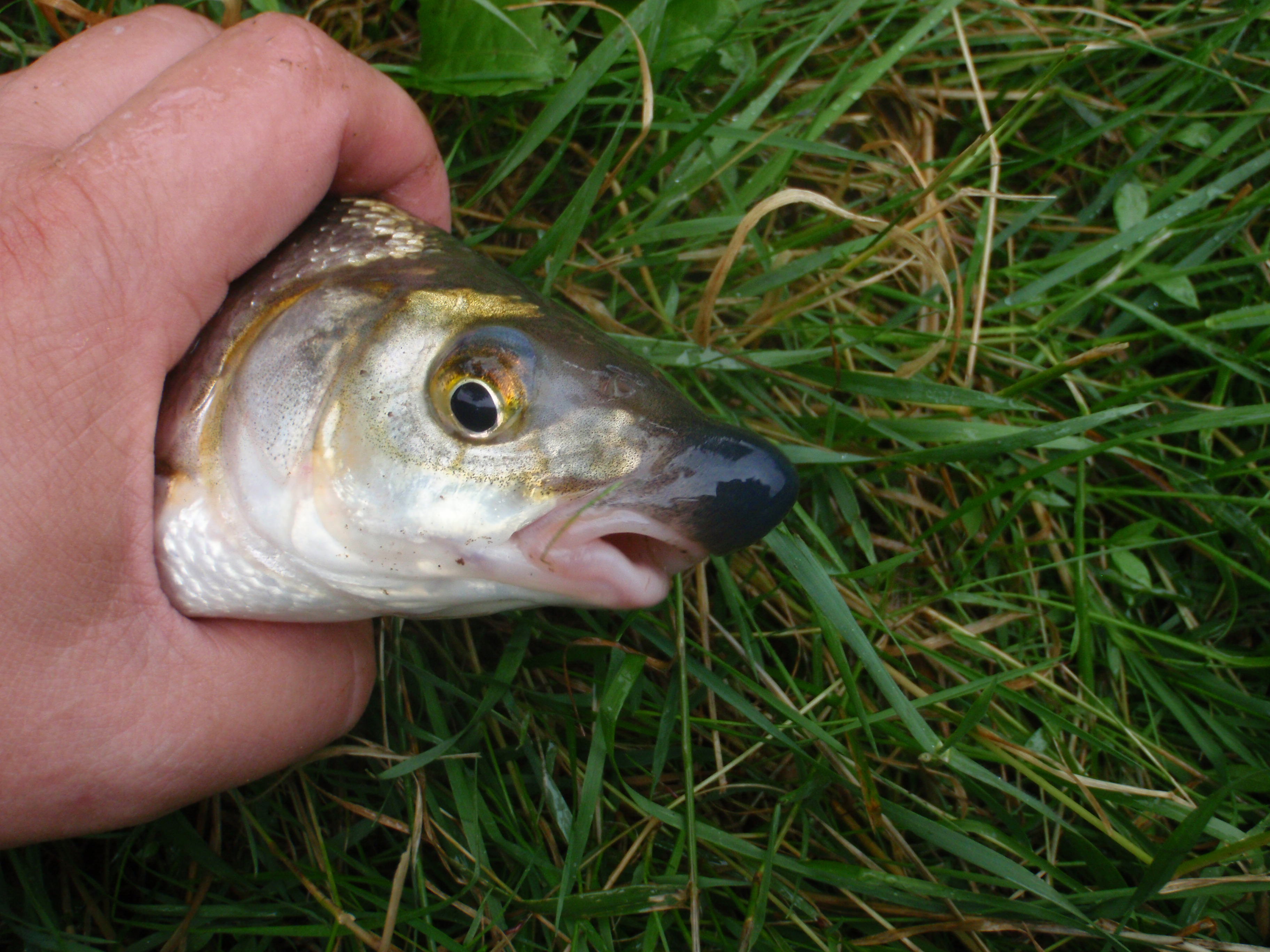 Portrait einer Zährte, Rußnase, Vimba vimba